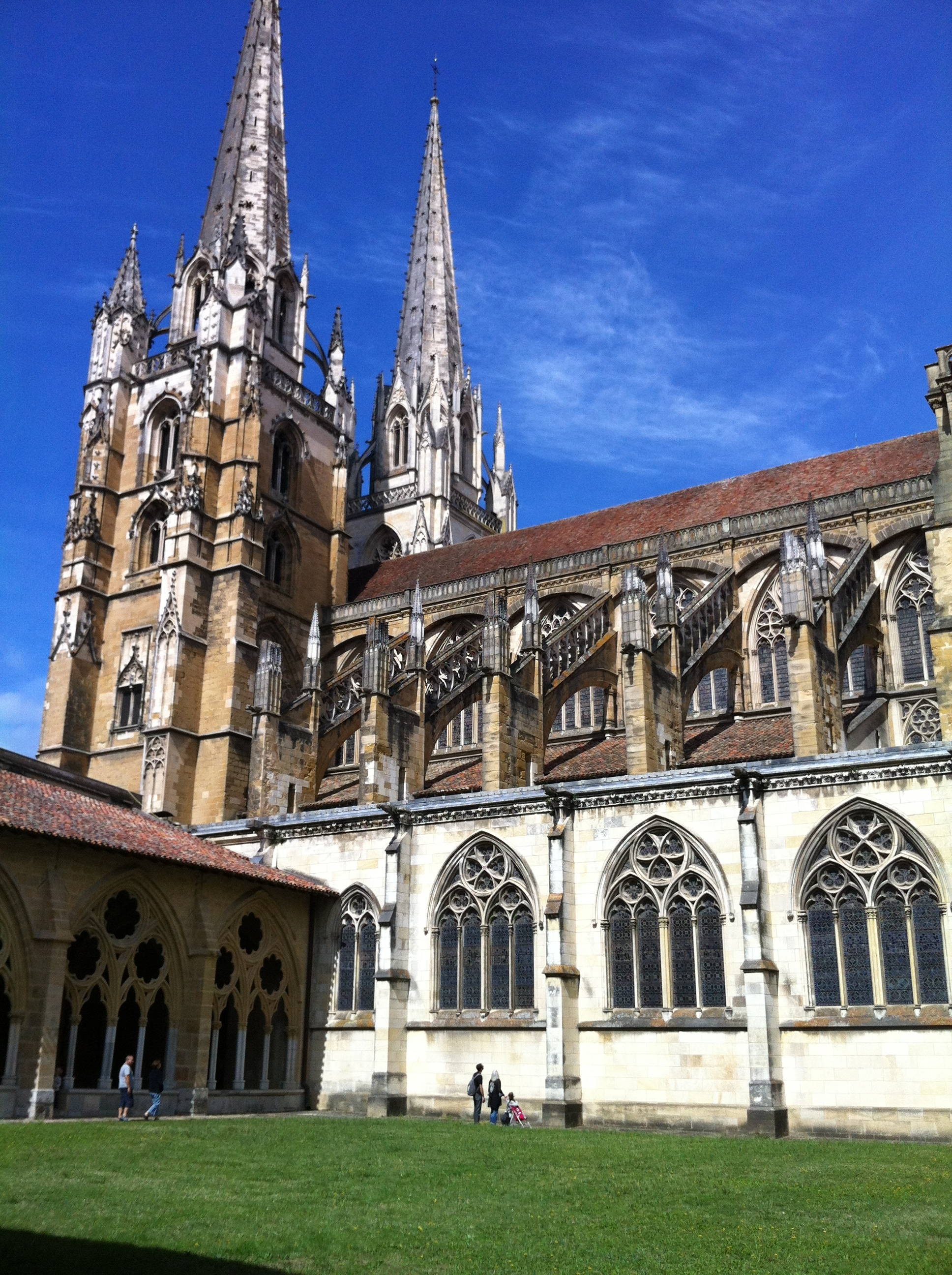 Cathédrale vue depuis le cloître de bayonne